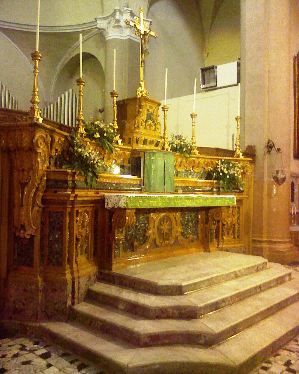 Chiesa Maria Santissima Annunziata - Modugno (Bari) - Italy